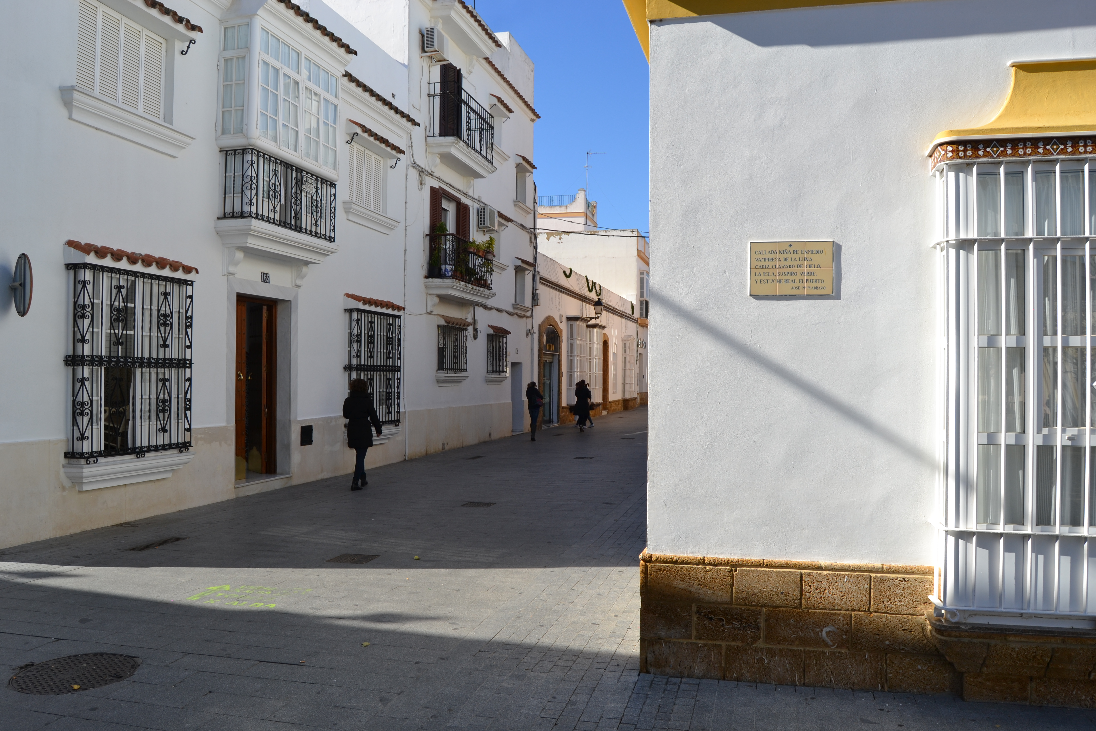 Puerto Real, Andalucía, España